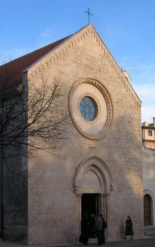 = Licenza d'uso ==